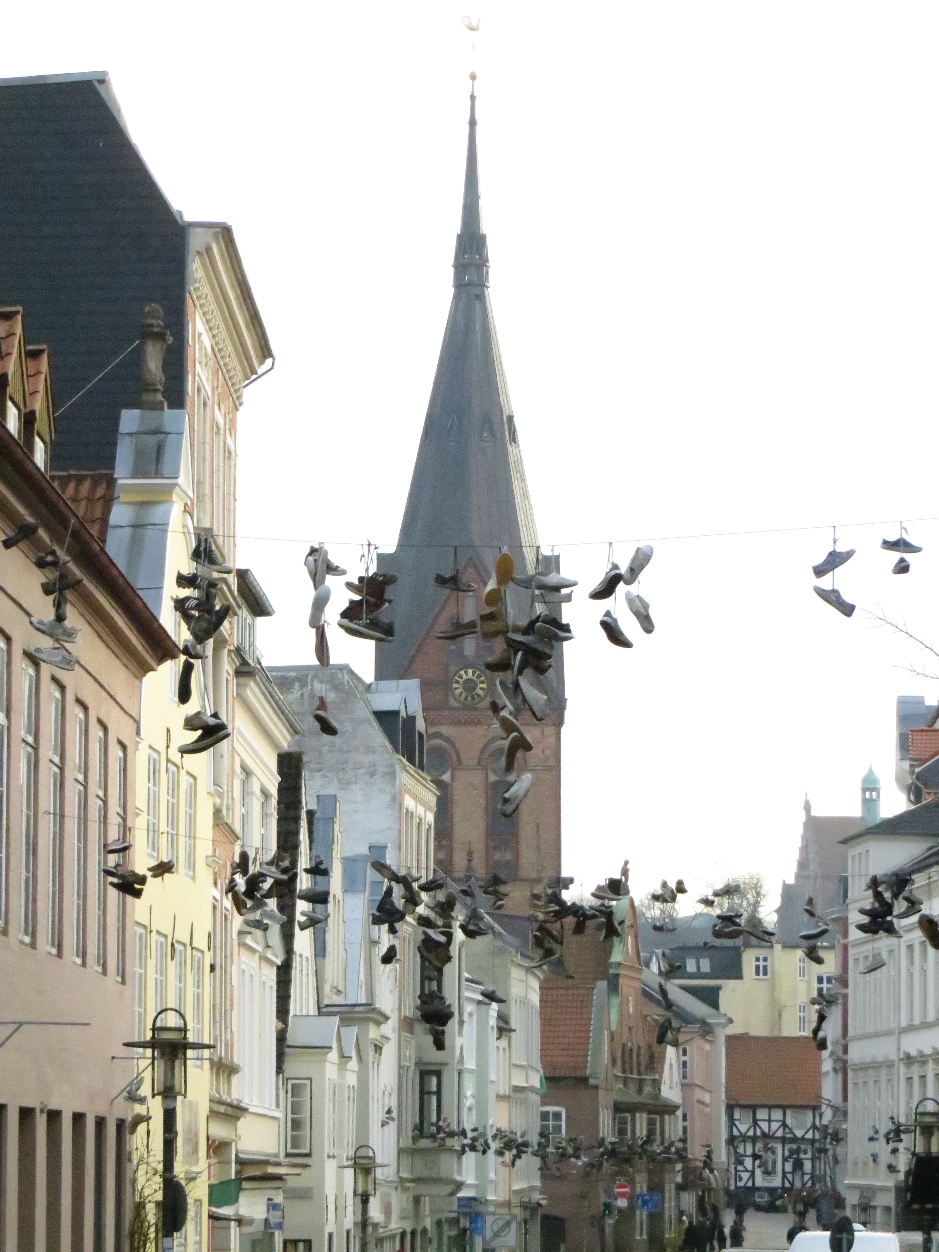 Blick durch die Norderstraße mit den Hängenden Schuhen zur Marienkirche (Flensburg), Bild 01